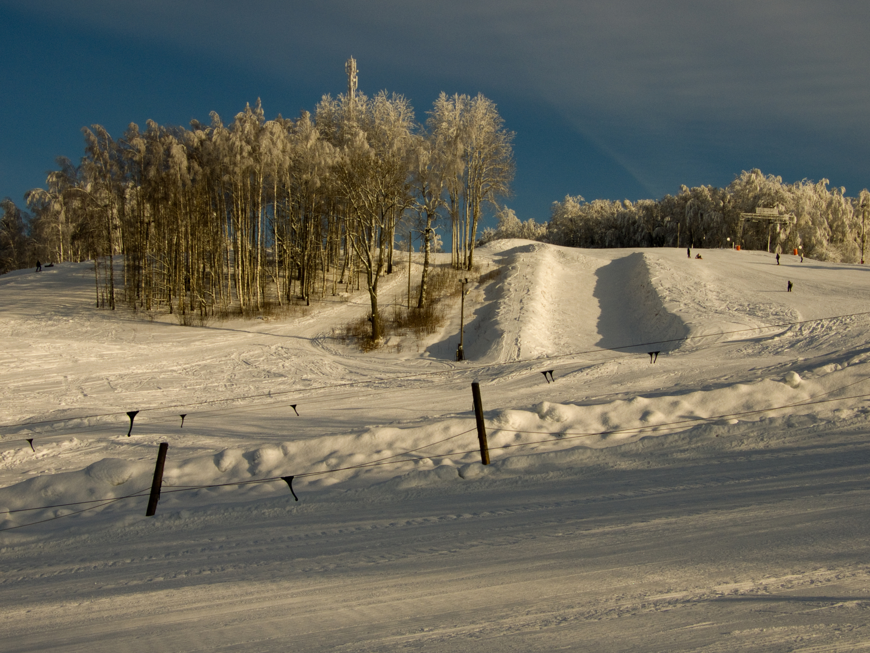 Kuutsemägi